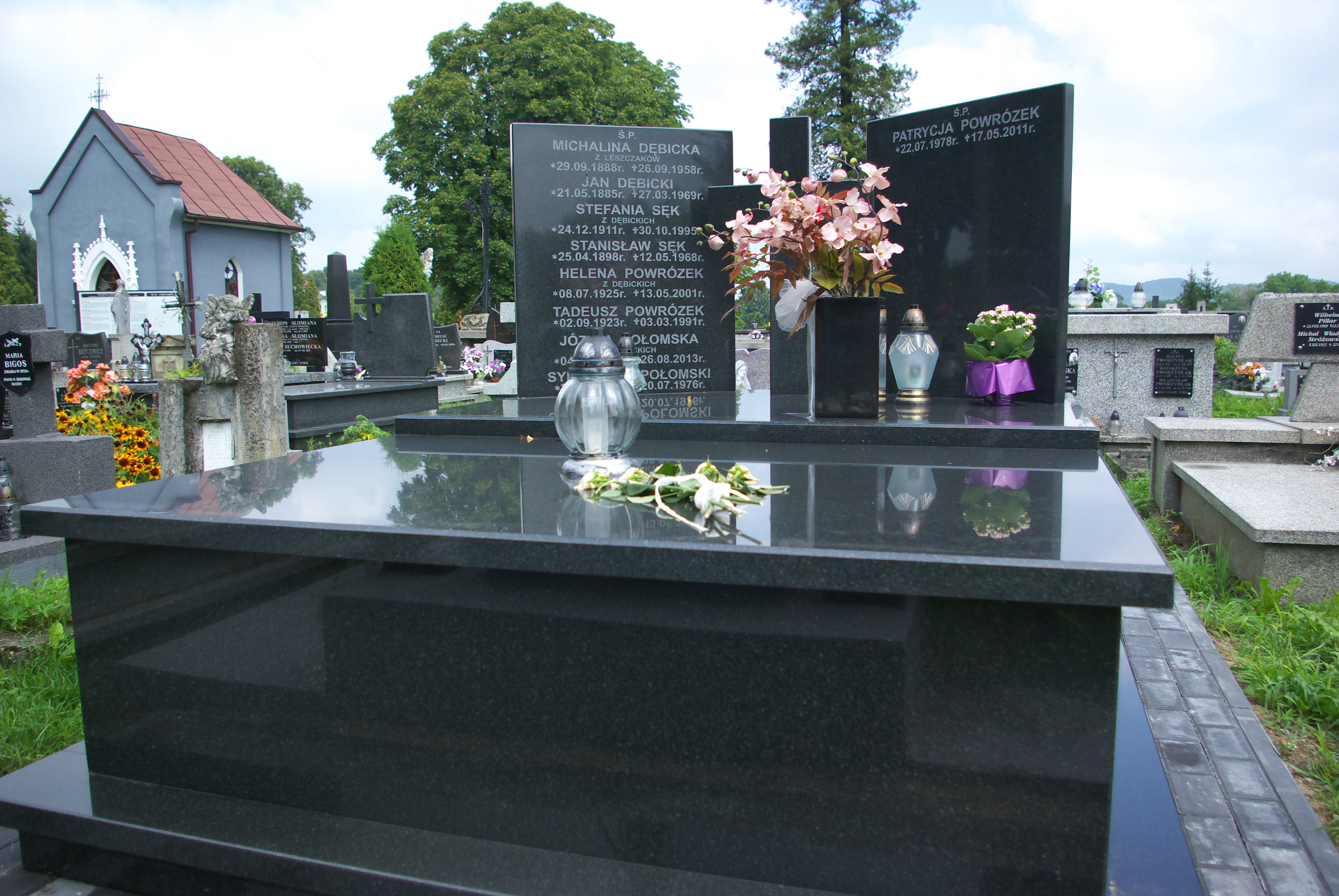 Grobowiec rodzin Dębickich, Sęków, Połomskich i Powrózek na Cmentarzu Centralnym w Sanoku